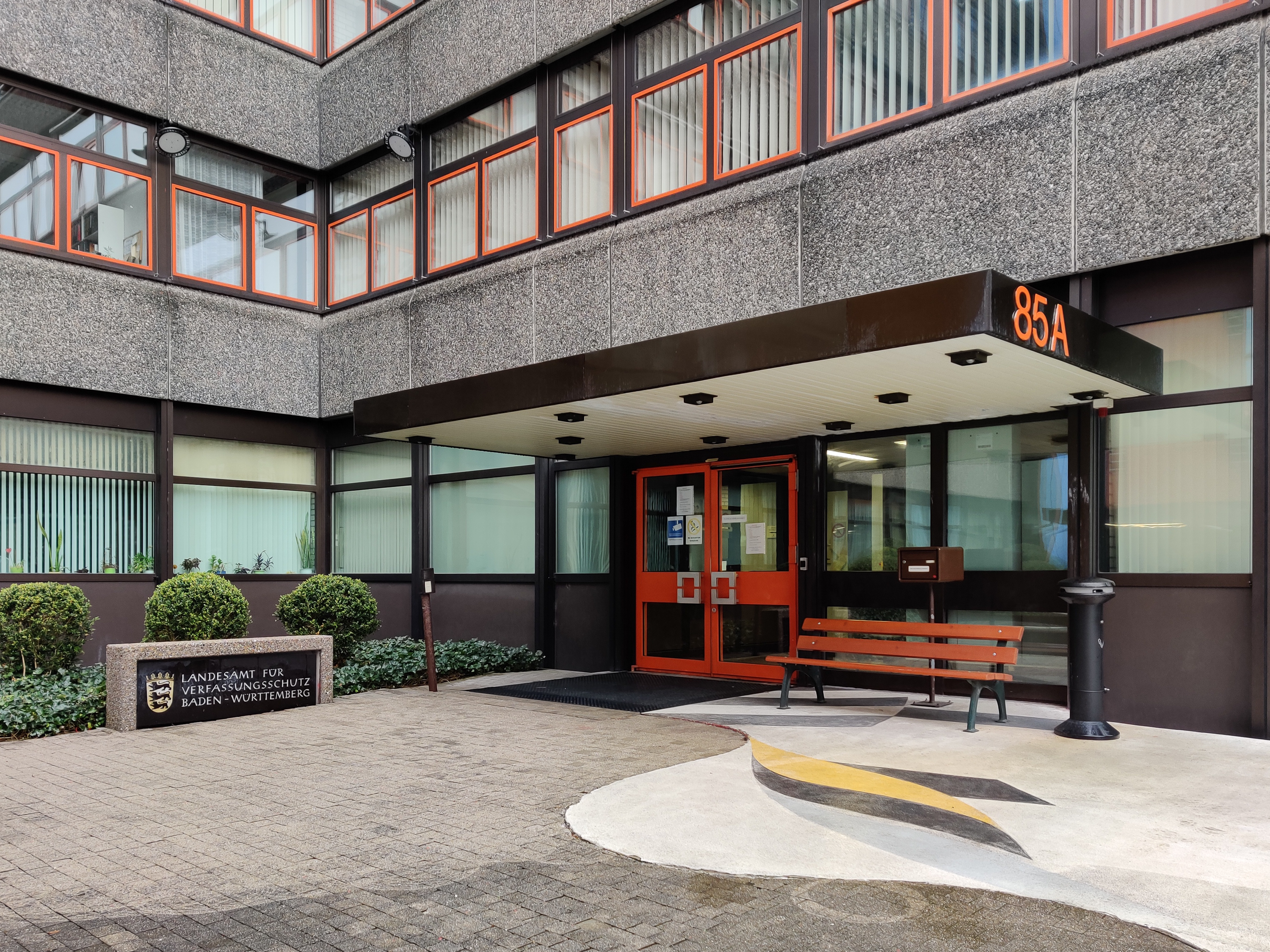 Das Landesamt für Verfassungsschutz Baden-Württemberg in der Taubenheimstraße 85a, Bad Cannstatt.